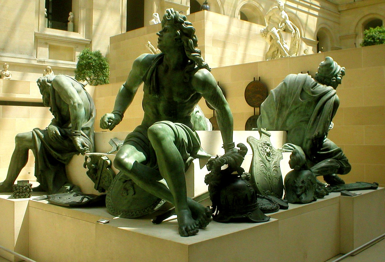 Reste des éléments décoratifs du socle de la statue par Martin Desjardins de Louis XIV sur la Place des Victoires à Paris aujourd'hui disparue. Exposés dans la cour Puget, musée du Louvre. Prise de vue personnelle, juin 2005. 13 février 2006 à 06:22 (CET)